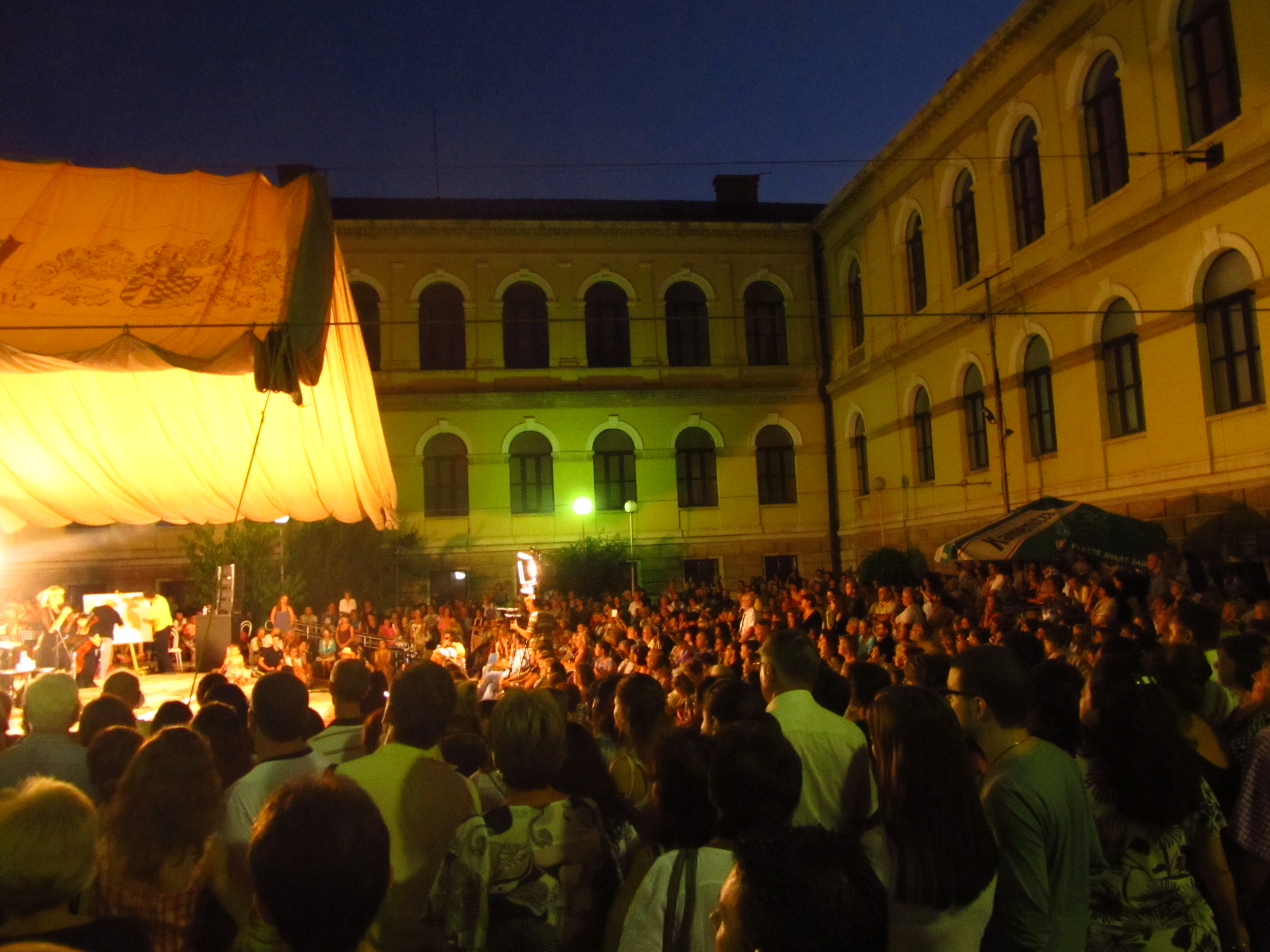 Концерт в дворике Варненского археологического музея в рамках Международного джазового фестиваля "Варненское лето"